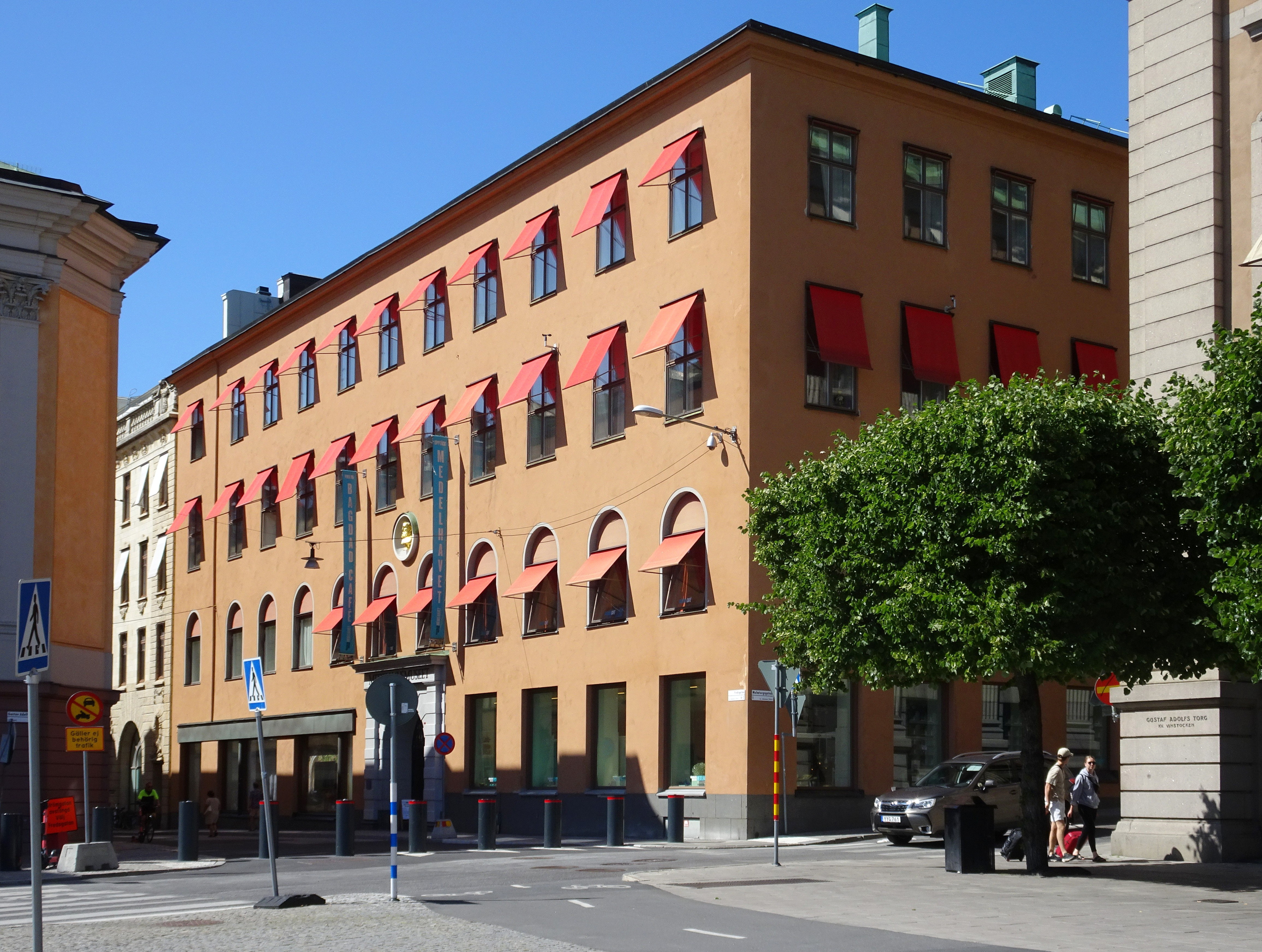 Medelhavsmuseet, sett från Gustav Adolfs torg